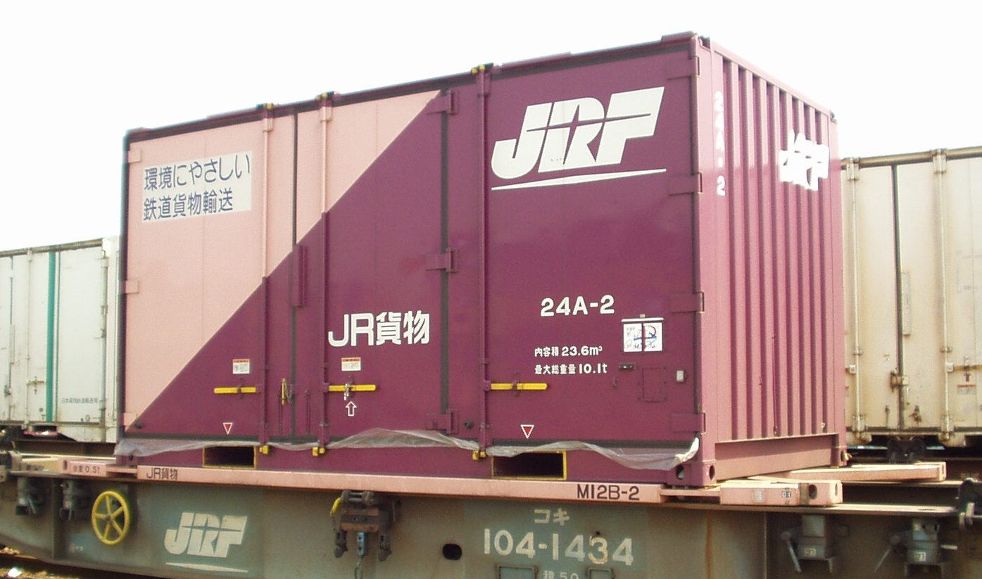 撮影地＝【大阪(タ)】